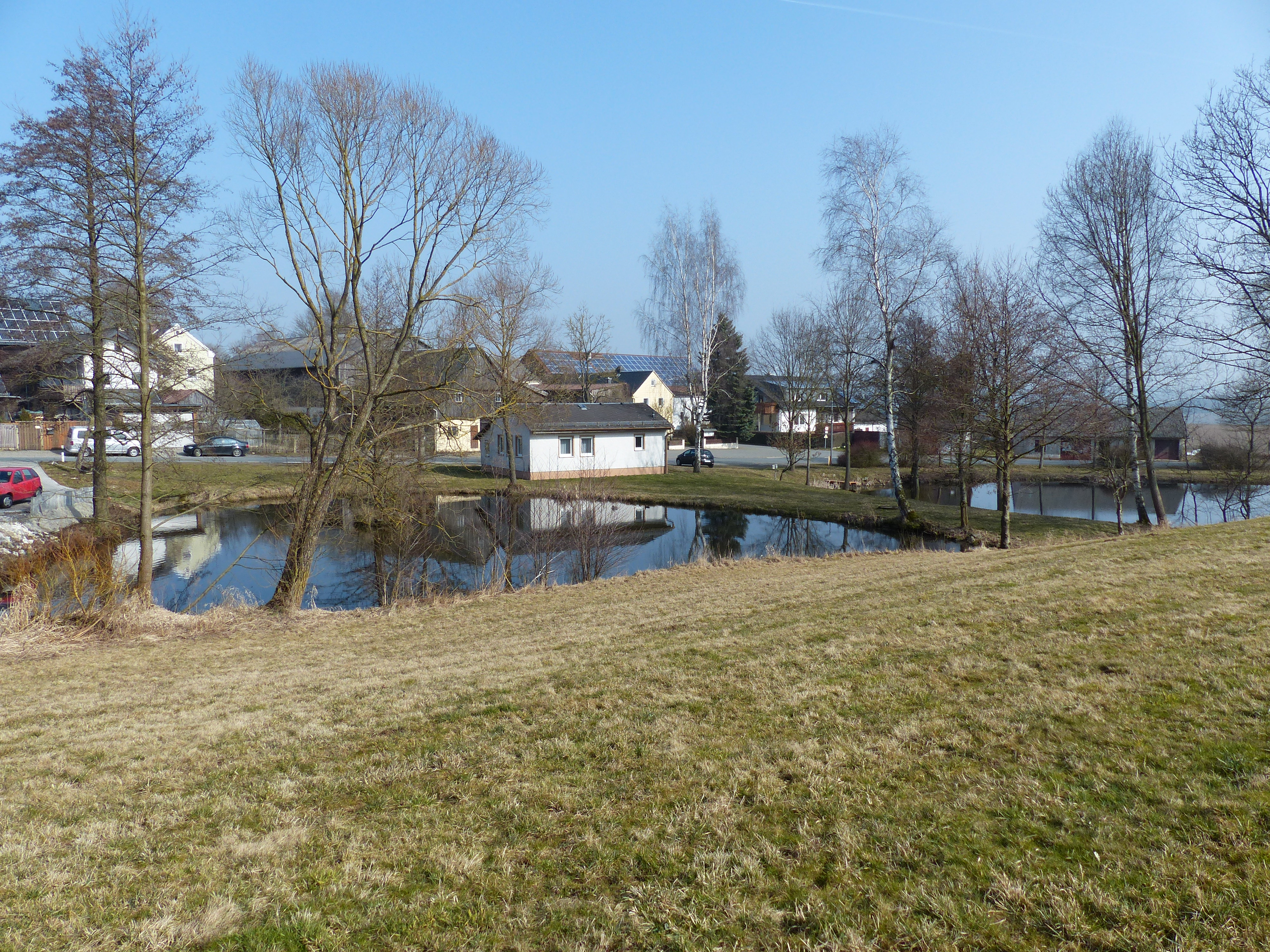 Ansicht der Ortsmitte von Fletschenreuth